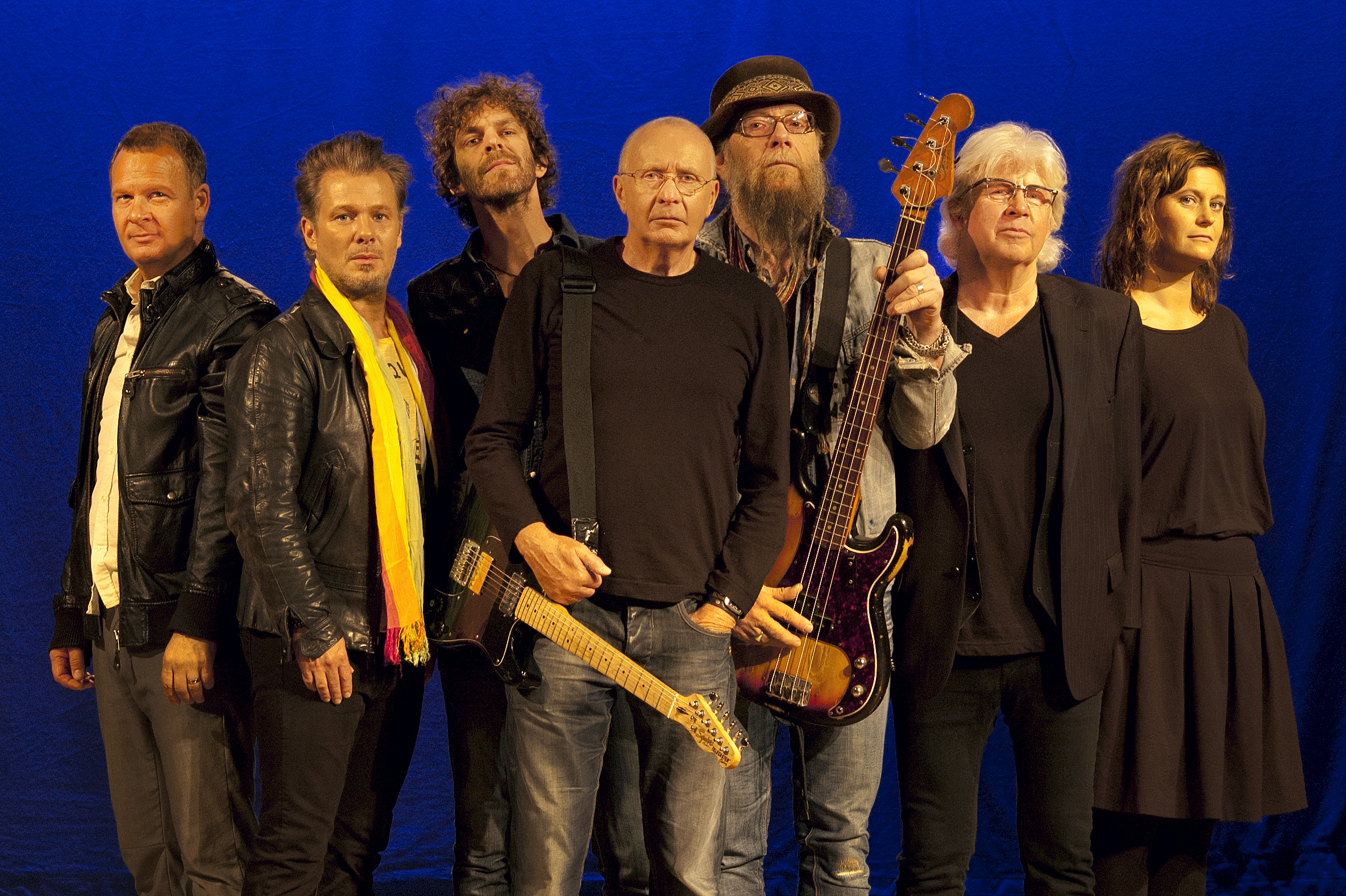 Nationalteaterns Rockorkester 2013. Från vänster till höger: Ulf Stenberg, Håkan Svensson, Mattias Hellberg, Ulf Dageby, Nikke Ström, Håkan Nyberg och Matilda Sjöberg.